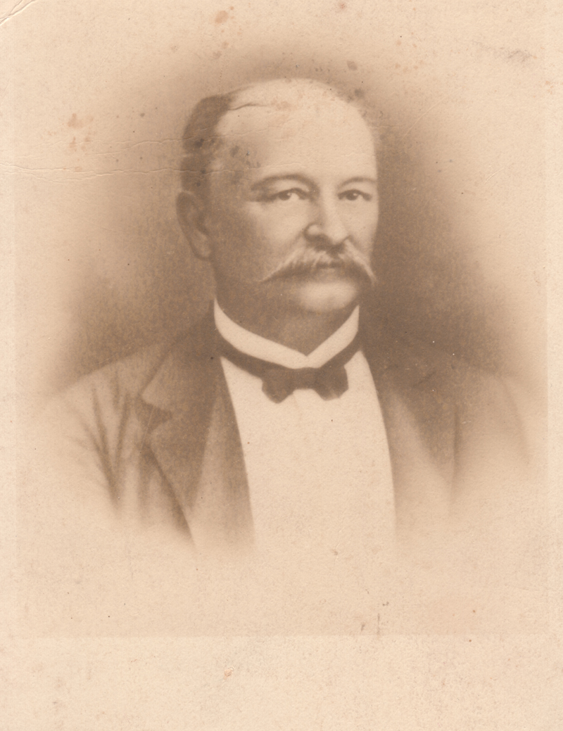 Eduardo López Rivas (1850-1913) Foto del famoso periodista Zuliano Fuente: Familiar La fotografia data de 1906 aproximadamente Autor: Arturo Lares Baralt